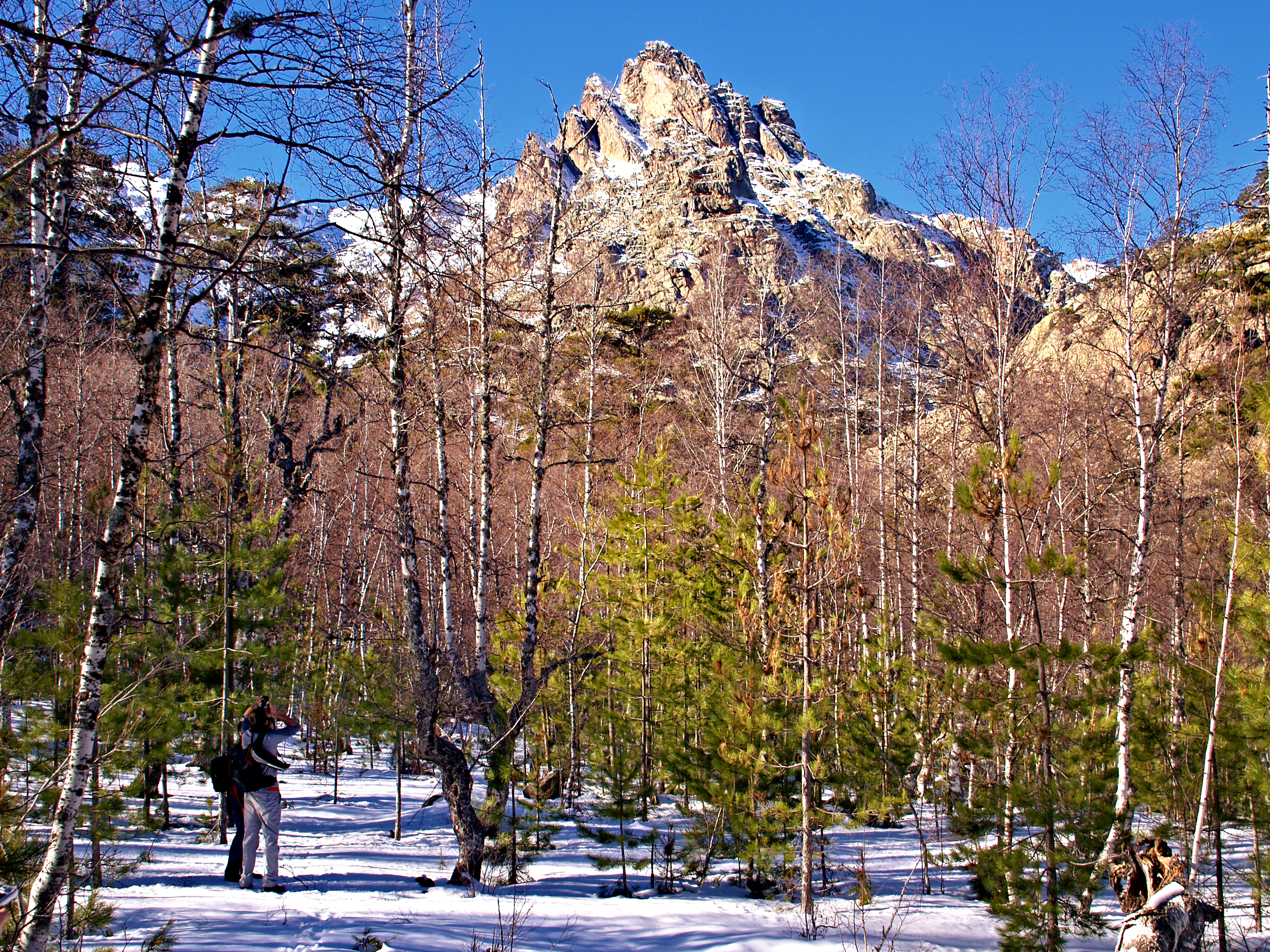 Albertacce (Corsica) - Forêt de Valdu Nellu - Radule